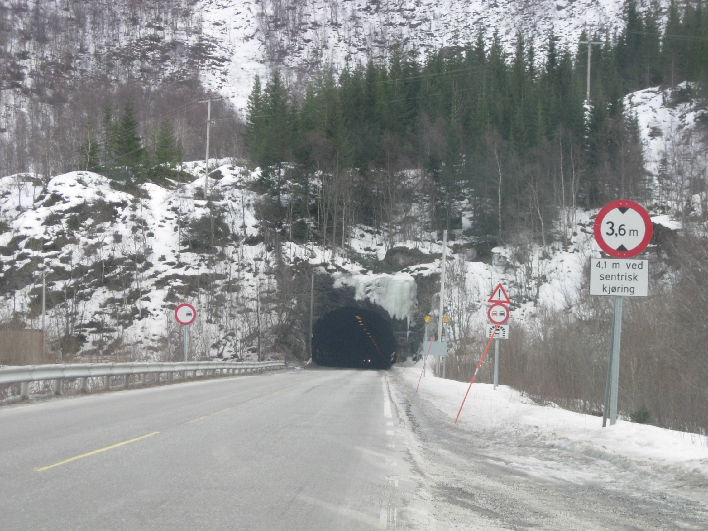 Grønnlifjelltunnelen